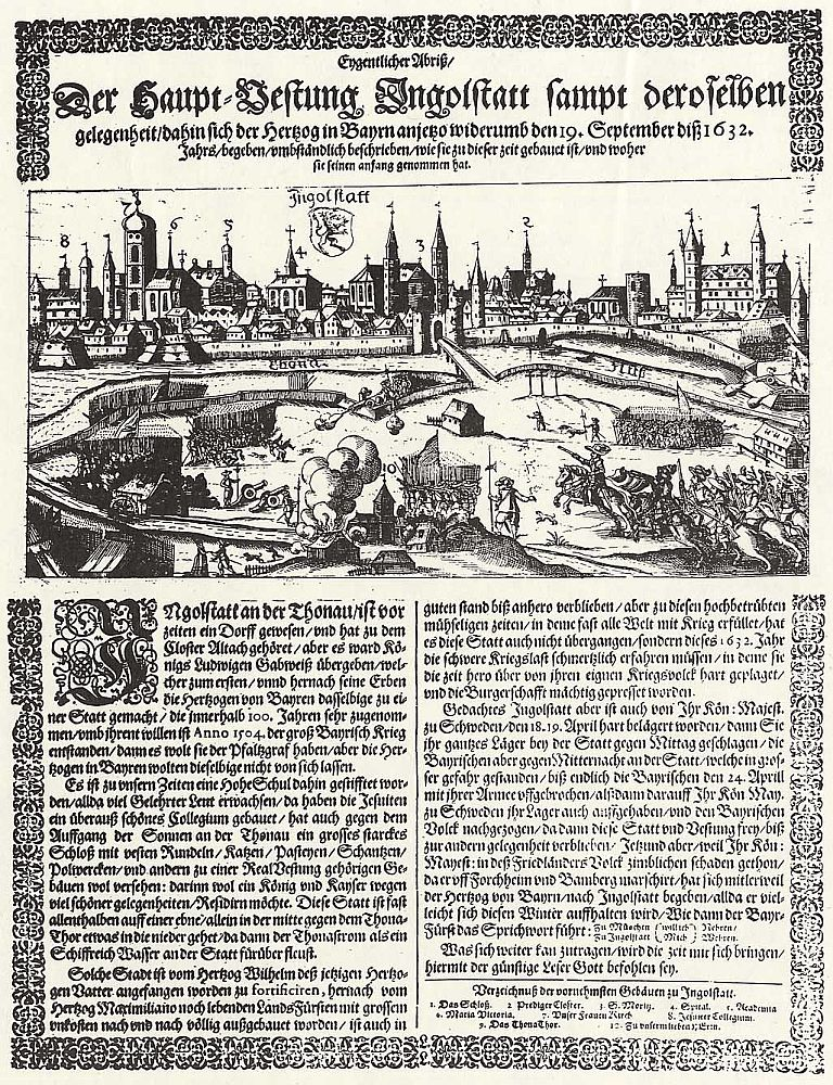 Belagerung der Festung Ingolstadt durch die Schweden